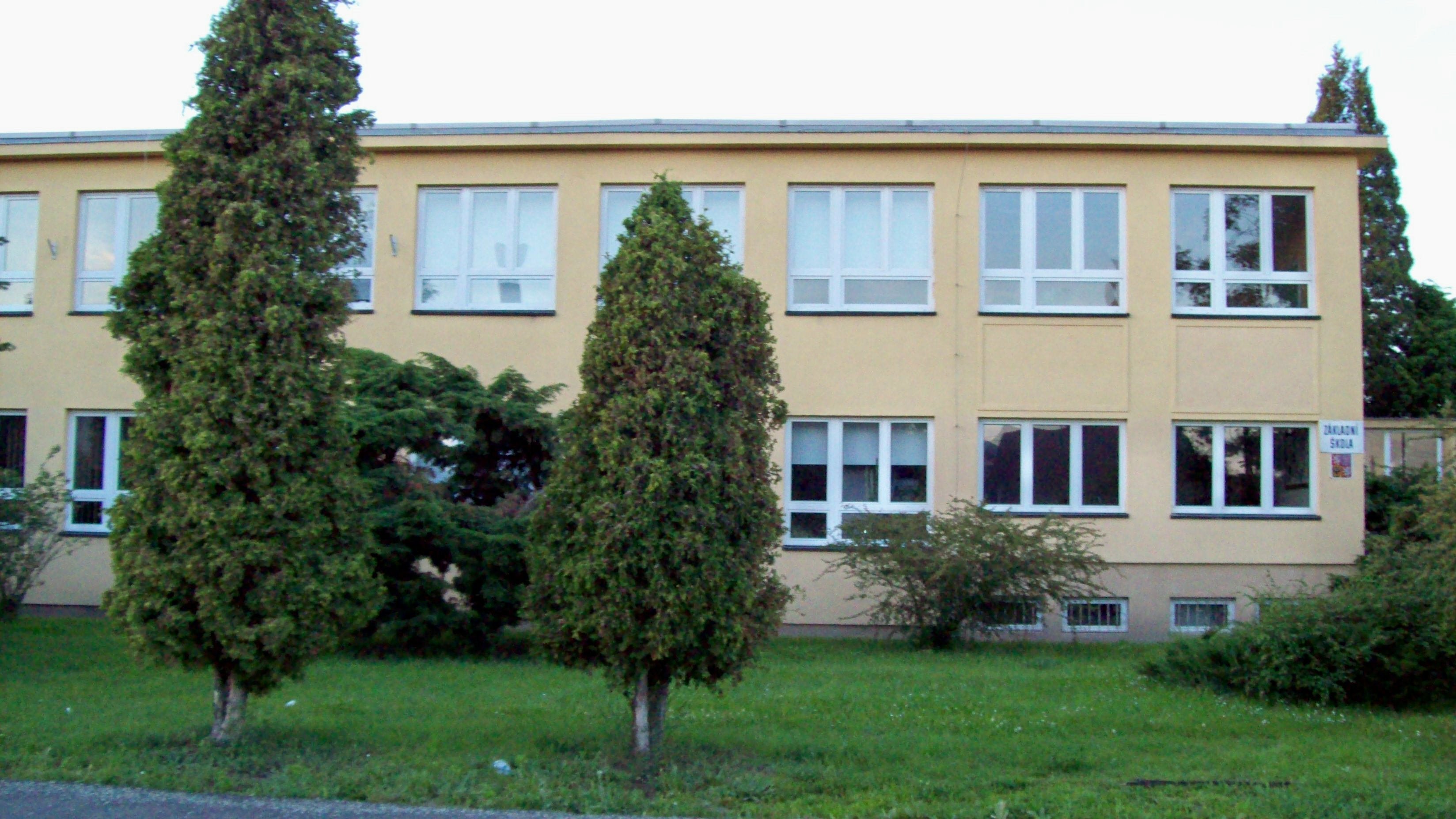 Základní škola Mělník - Pšovka, první stupeň (I.-V. třída), ul. Panešova 1033, Mělník.